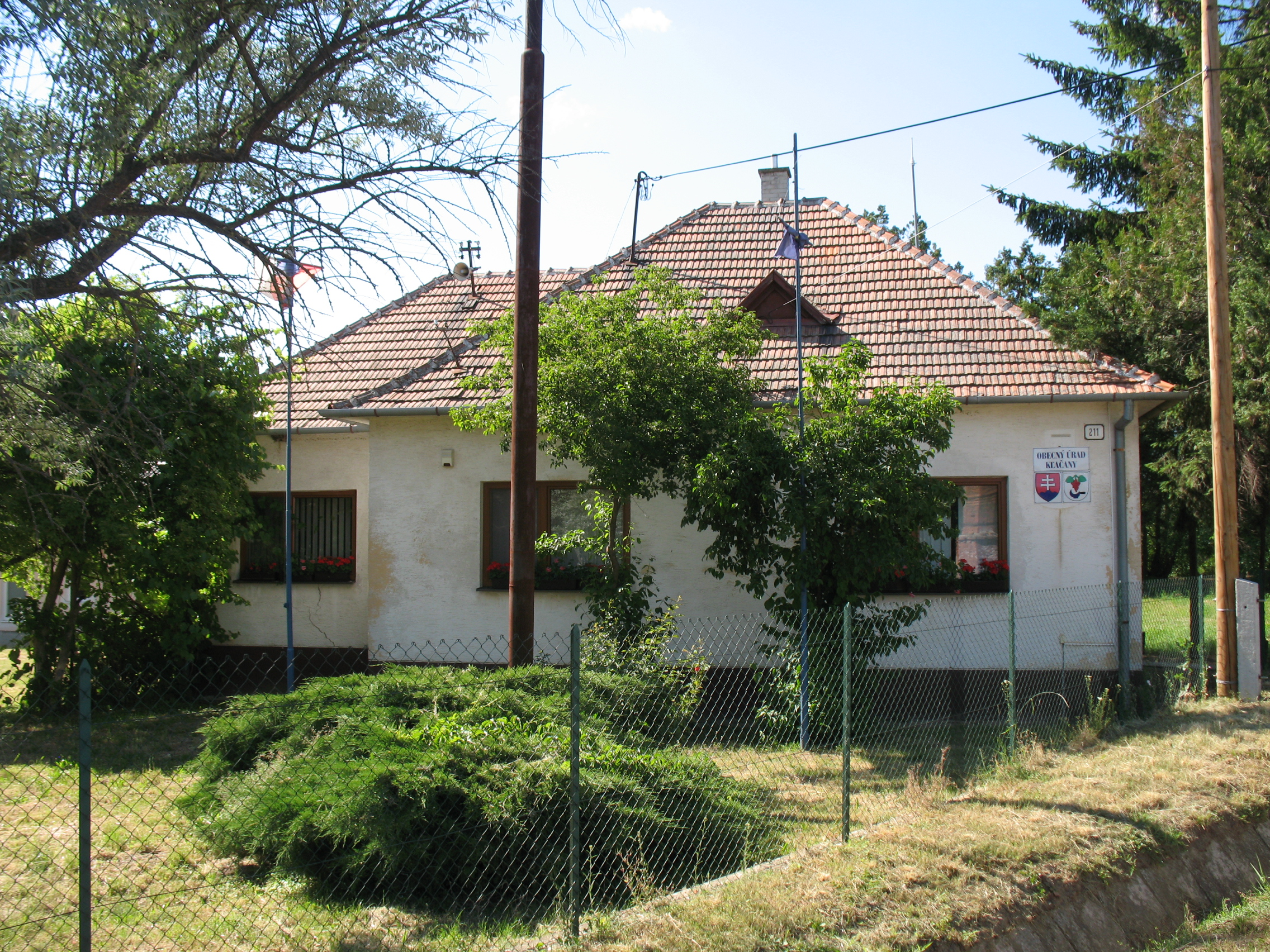 Décskelecsény